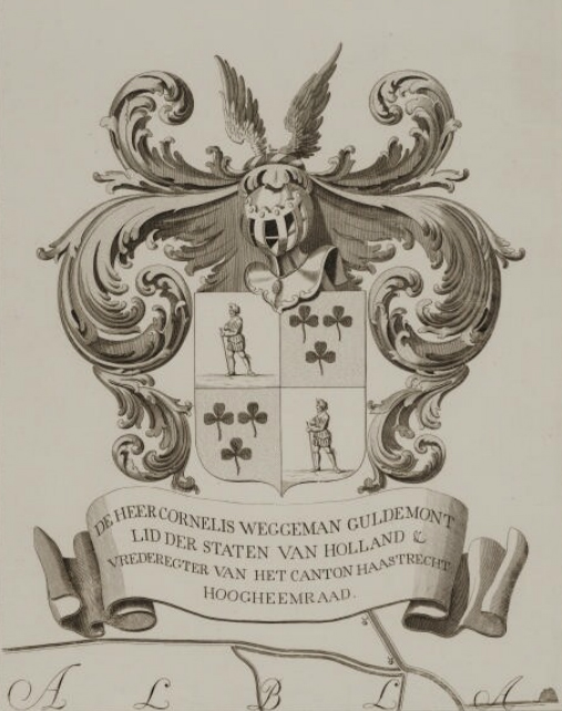 Wapen Cornelis Weggeman Guldemont (1775-1855) hoogheemraad Krimpenerwaard